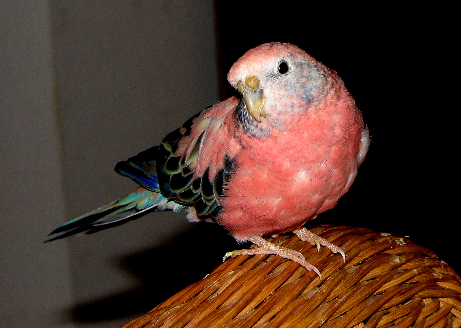 Bourke's parrot (Neopsephotus bourkii)